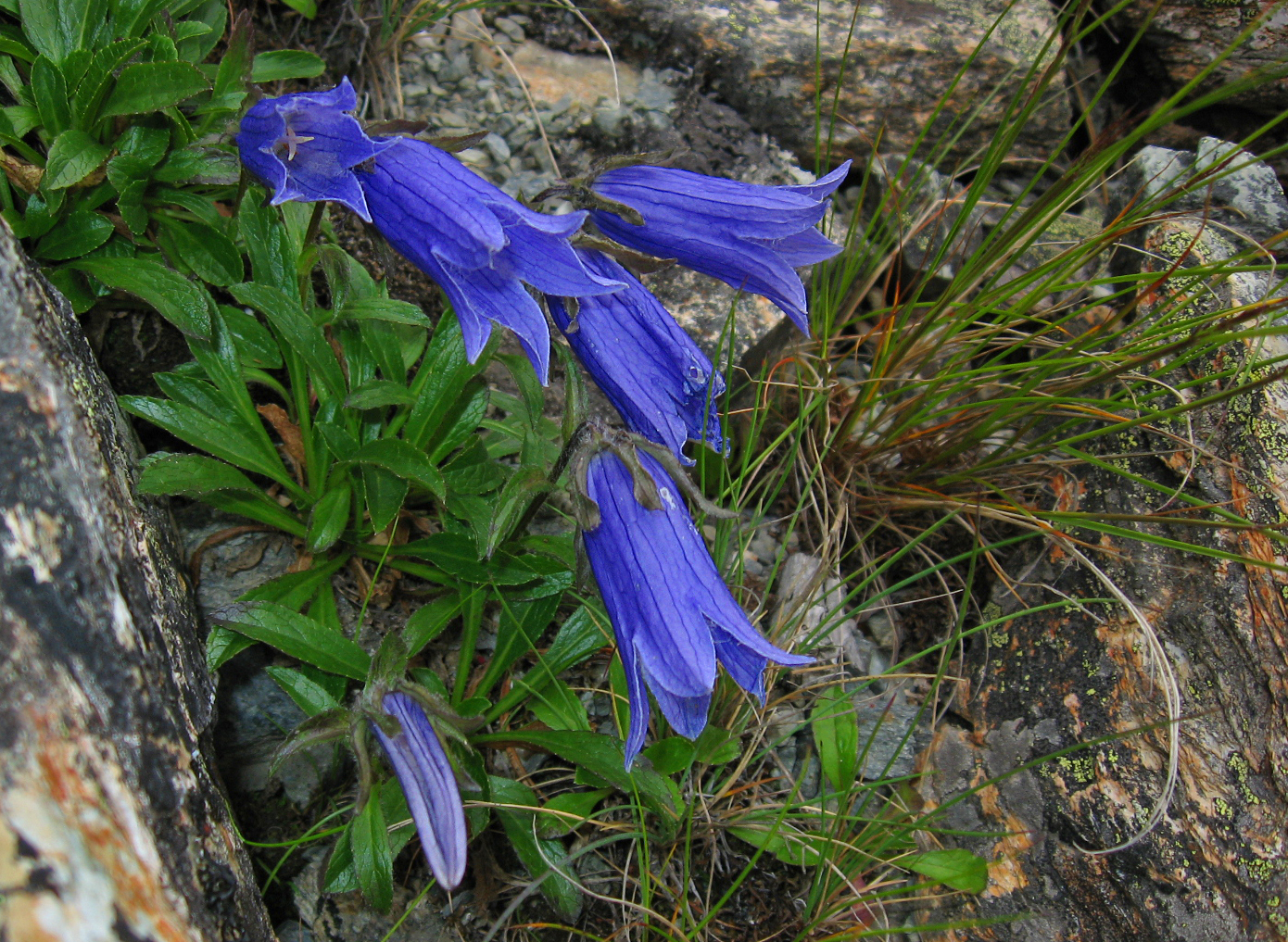 チシマギキョウ (学名：Campanula chamissonis)